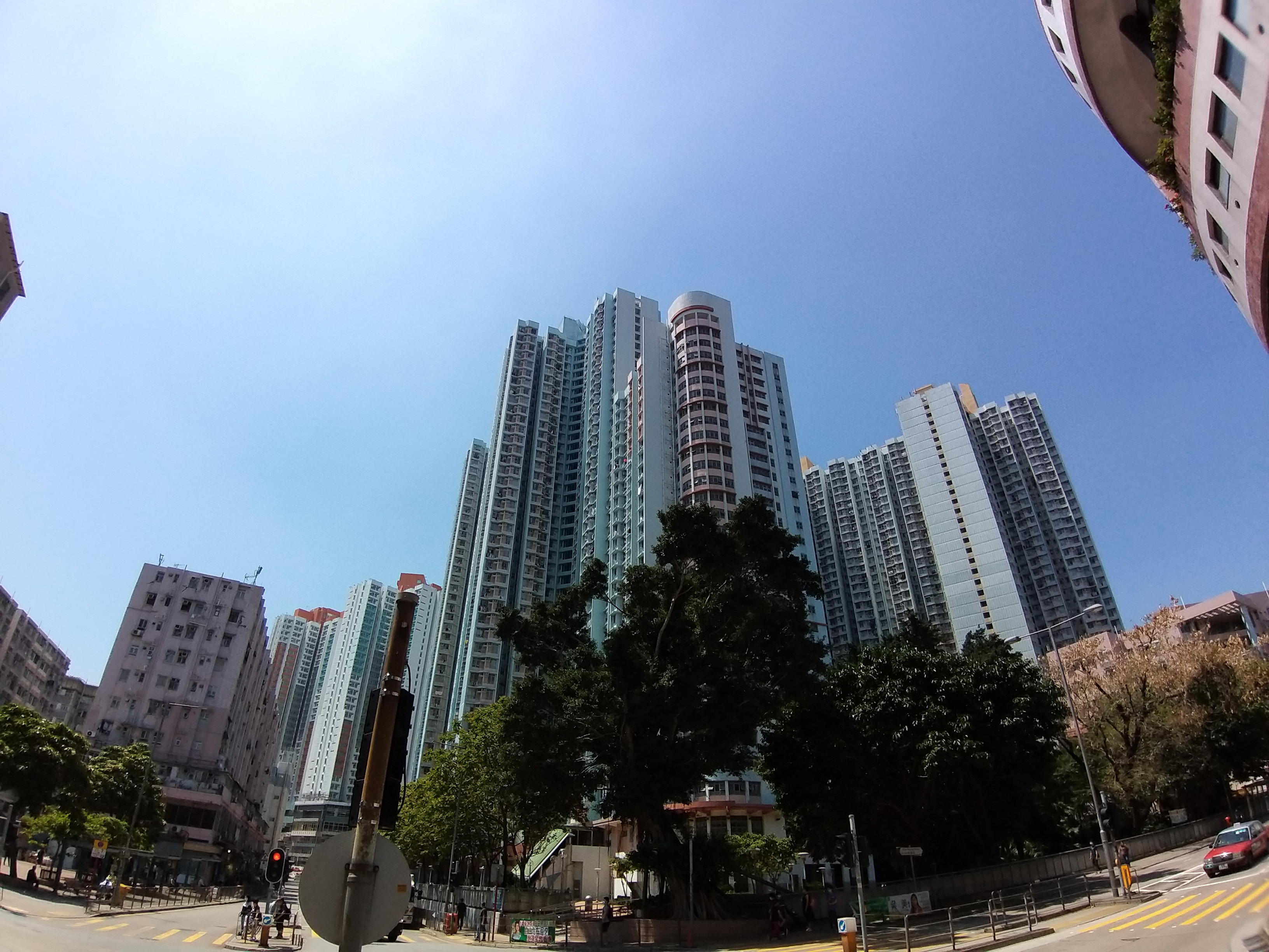 藍天白雲橙屋頂